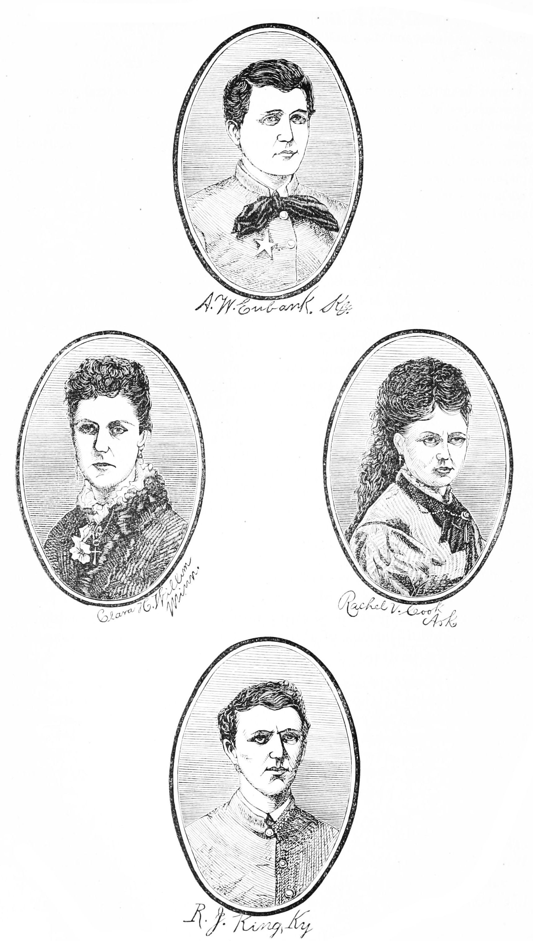 John M. Walton